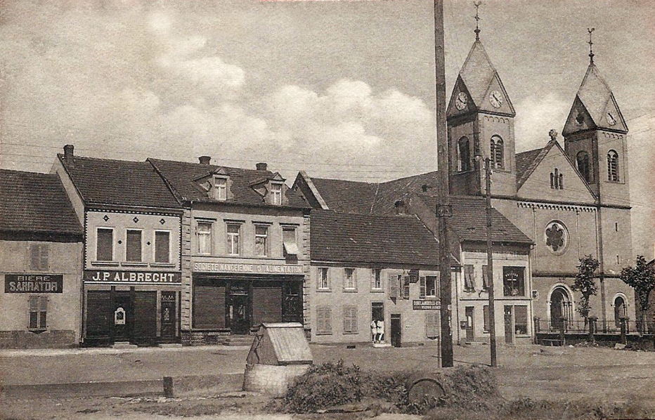 L'ancien puits et l'église, rue Principale à Carling (1921)